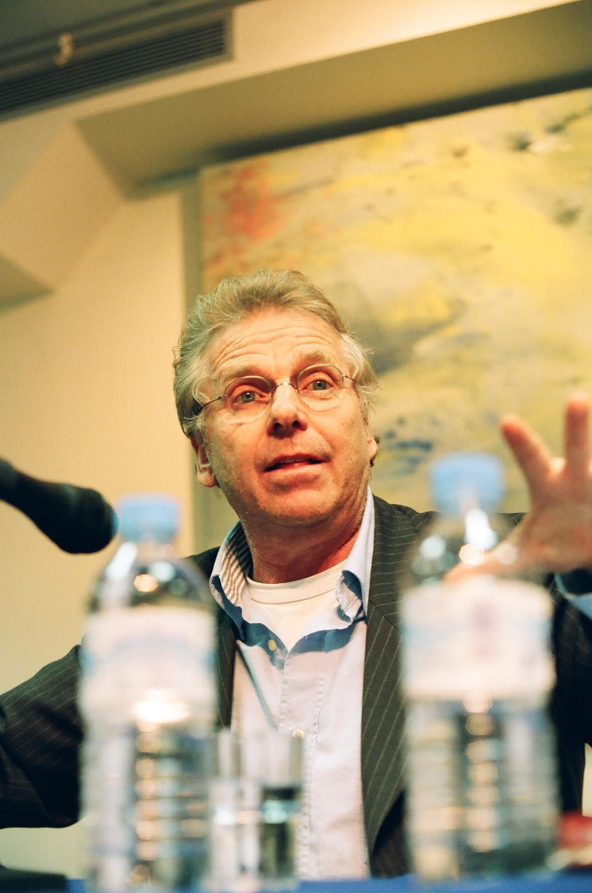 Daniel Cohn-Bendit au meeting à Paris